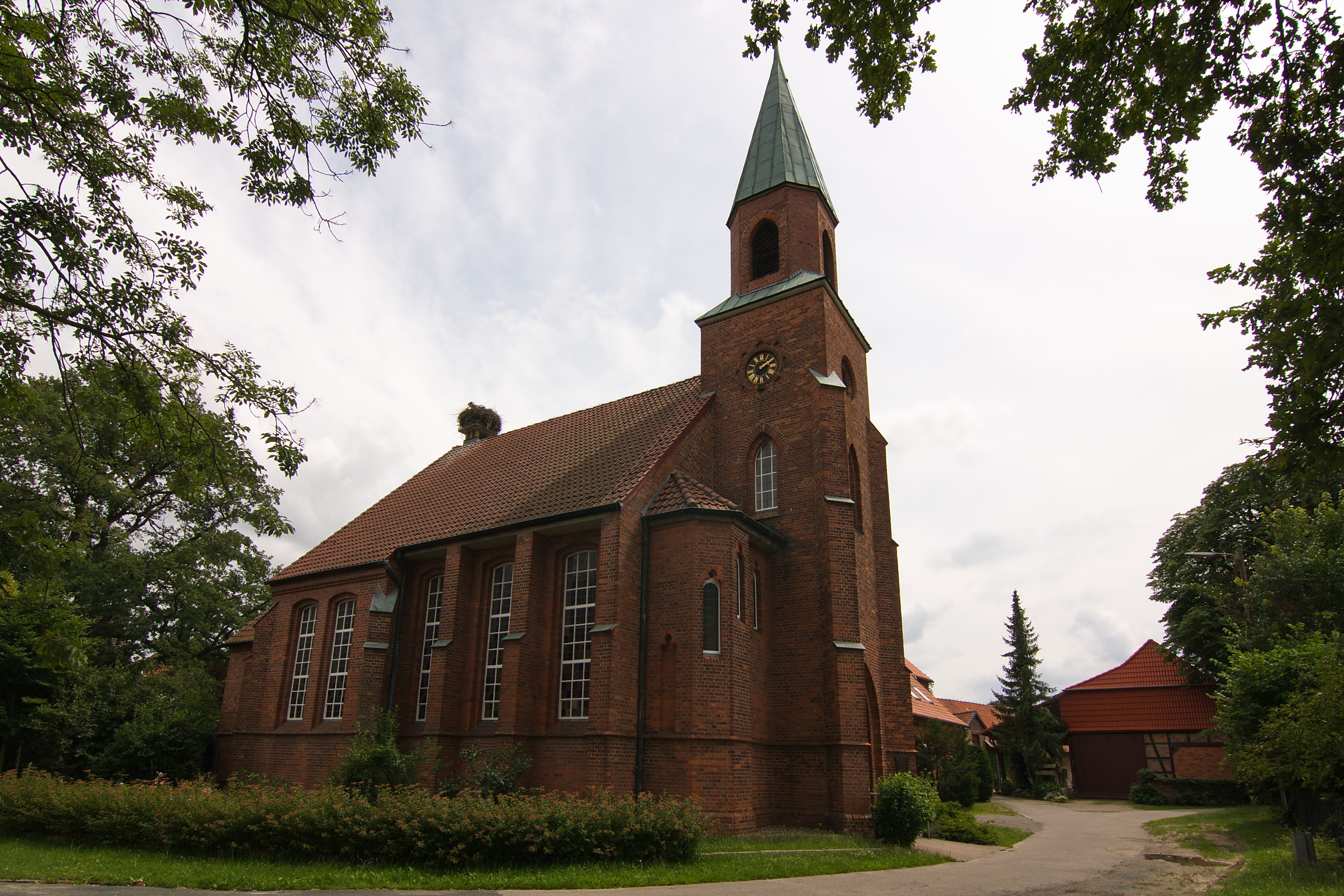 Kirche zum Heiligen Kreuz in Arpke (Lehrte) in Niedersachsen, Deutschland